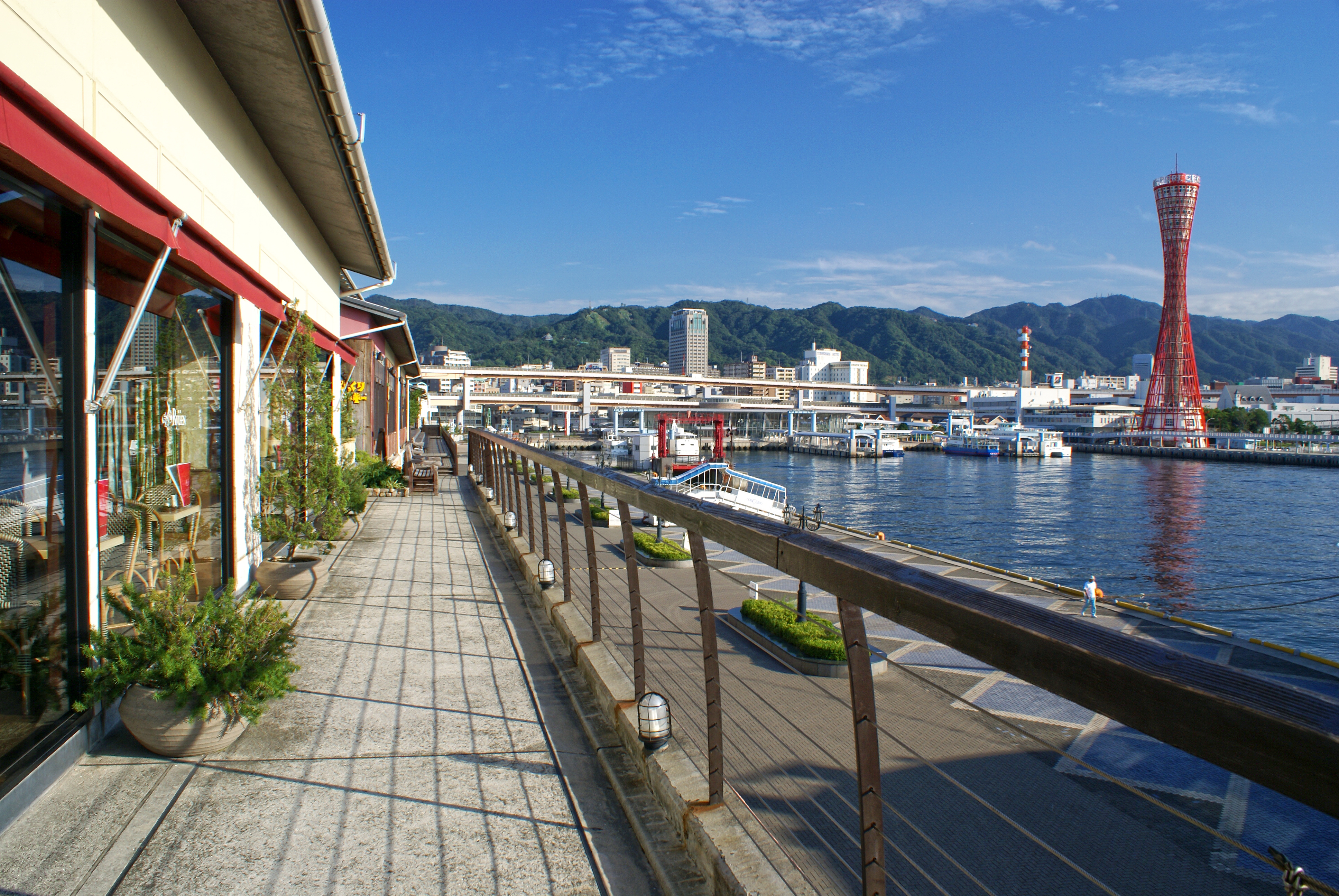 Harborland "Takahama-ganpeki" of the Kobe harbor ( Kobe, Hyogo, Japan)